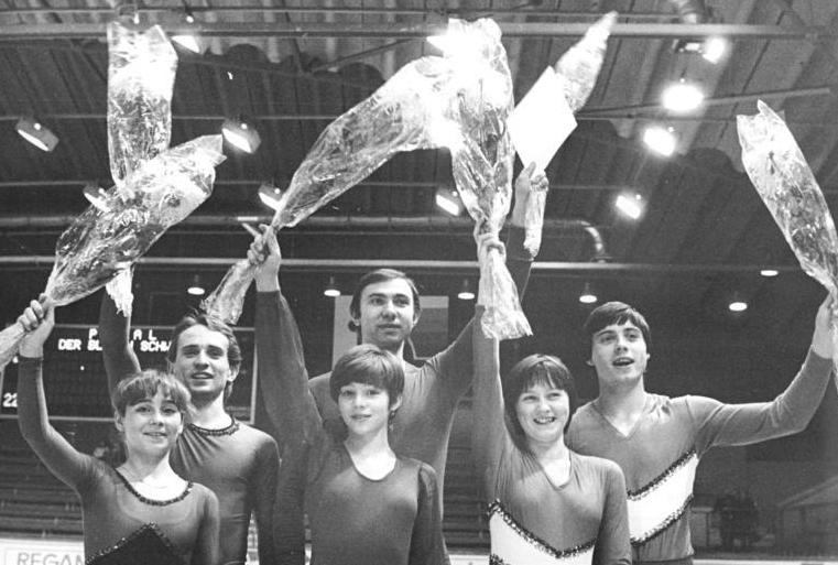 Eiskunstläufer, DDR, UdSSR ADN-ZB Thieme 15.11.80 Karl-Marx-Stadt: "Pokal der Blauen Schwerter"- Siegerehrung im Paarlaufen beim internationalen Eiskunstlaufwettbewerb um den "Pokal der Blauen Schwerter" am 14.11.80 in Karl-Marx-Stadt. Das sowjetische Paar Inna Wolanskaja und Waleri Spiridonow (Mitte) gewann den Pokal. Birgit Lorenz und Knut Schubert aus der DDR (l.) belegten den 2.Platz vor Cornelia Haufe und Karsten Bellmann (r.), ebenfalls DDR.